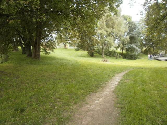 Linnuse õu, keskel auk maakividega